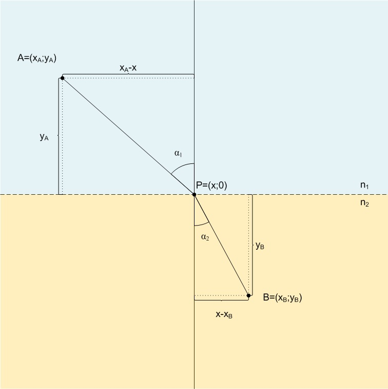 Esquema para demostrar a dedução da lei de Snell pelo princípio de Fermat.